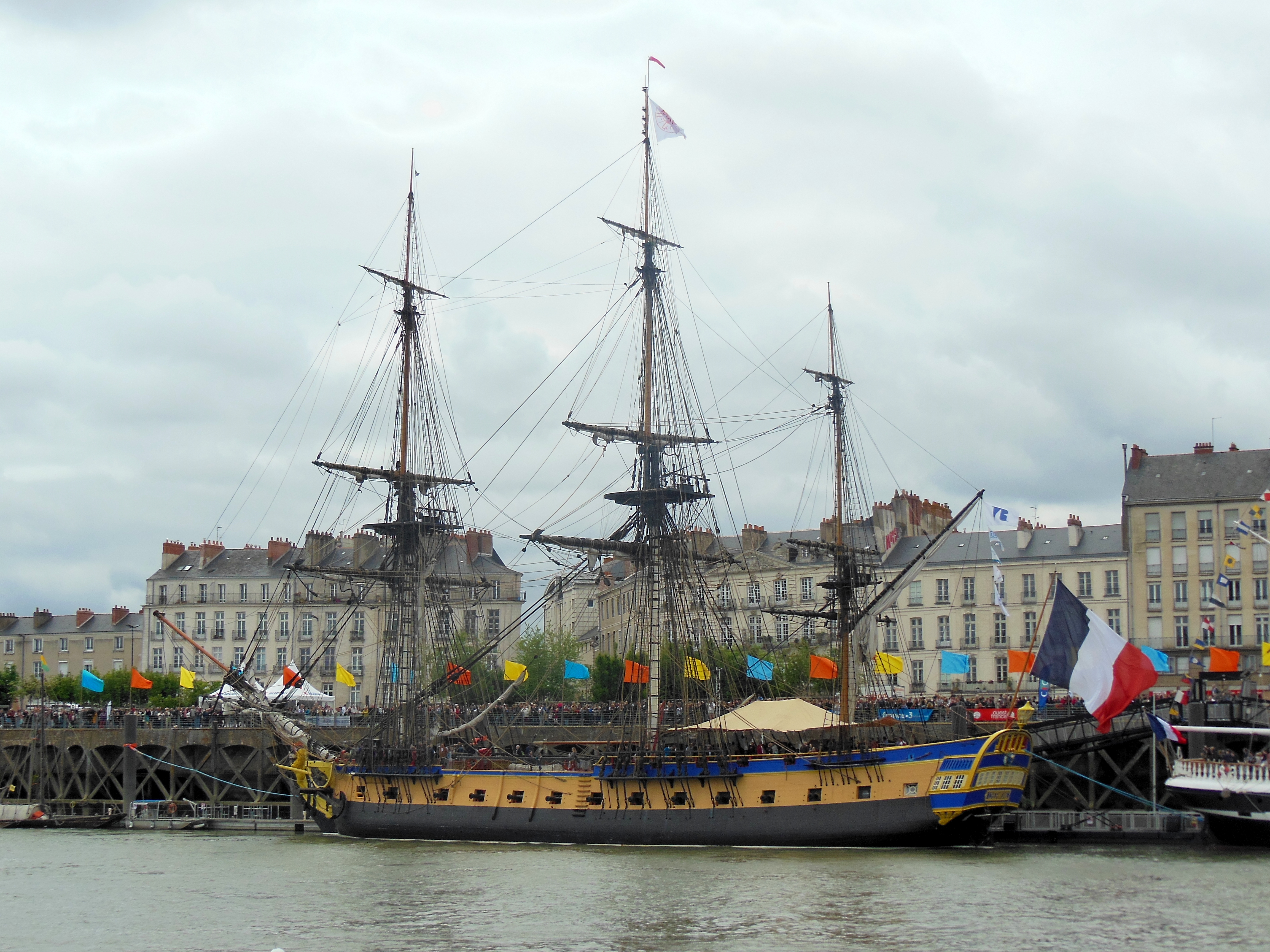 L'Hermione amarré quai de la Fosse à Nantes, 26 mai 2019, dans le cadre de l'événement débord de Loire. Première escale de l'Hermione dans le port de Nantes